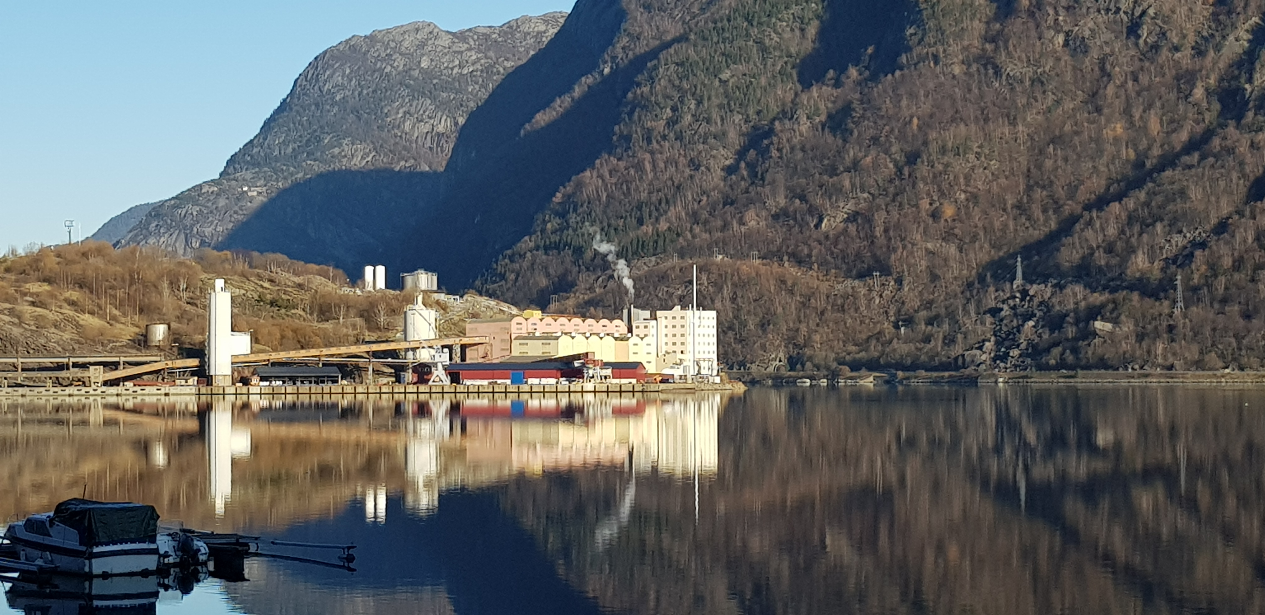 Noralf AS sett fra kai-siden. Inn og utskiping skjer fra denne kaien.